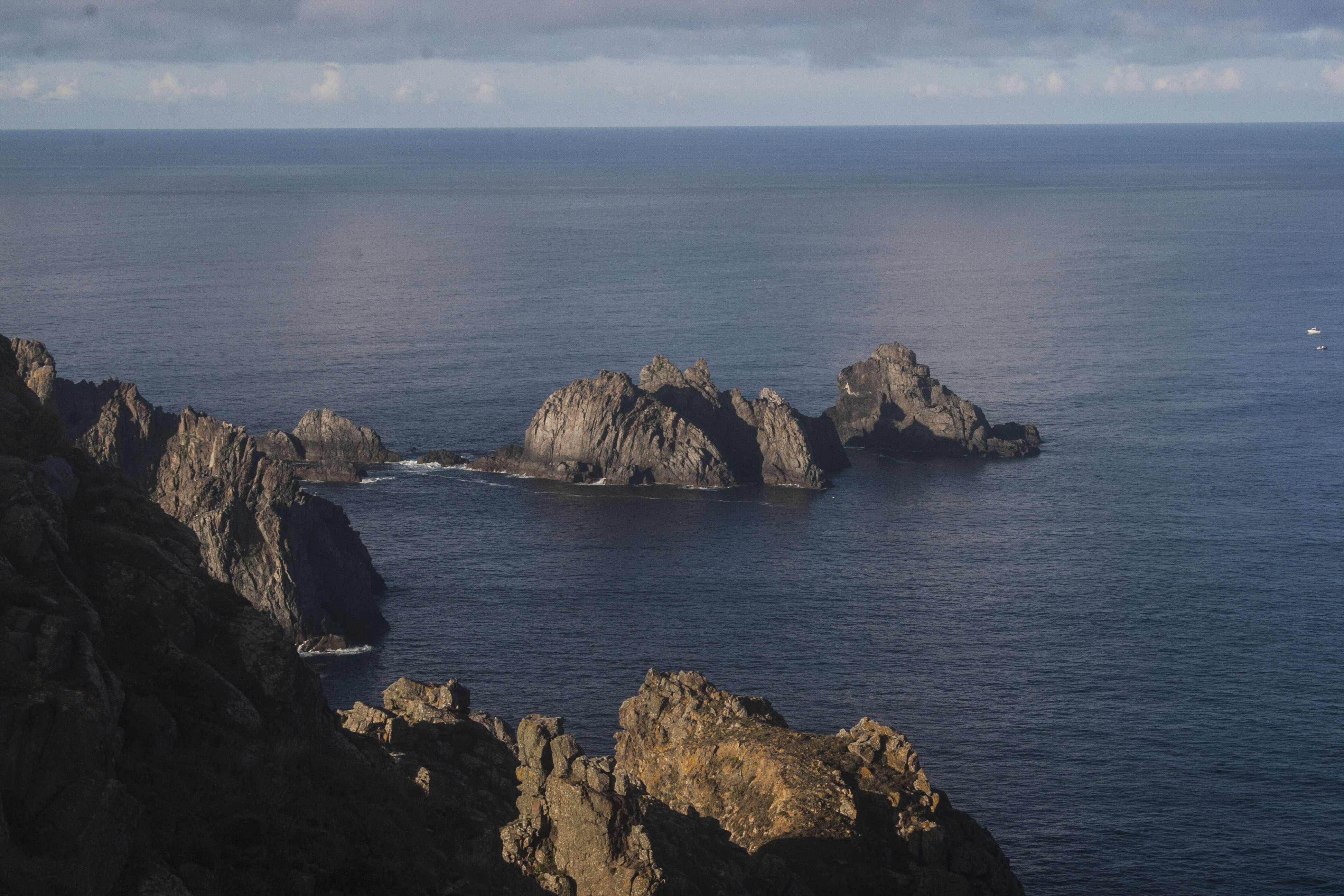 Vista de "Os tres Aguillóns" desde O Cabo Ortegal, Cariño.